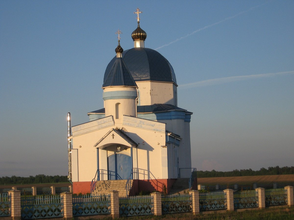 Вялікі Двор. Ца